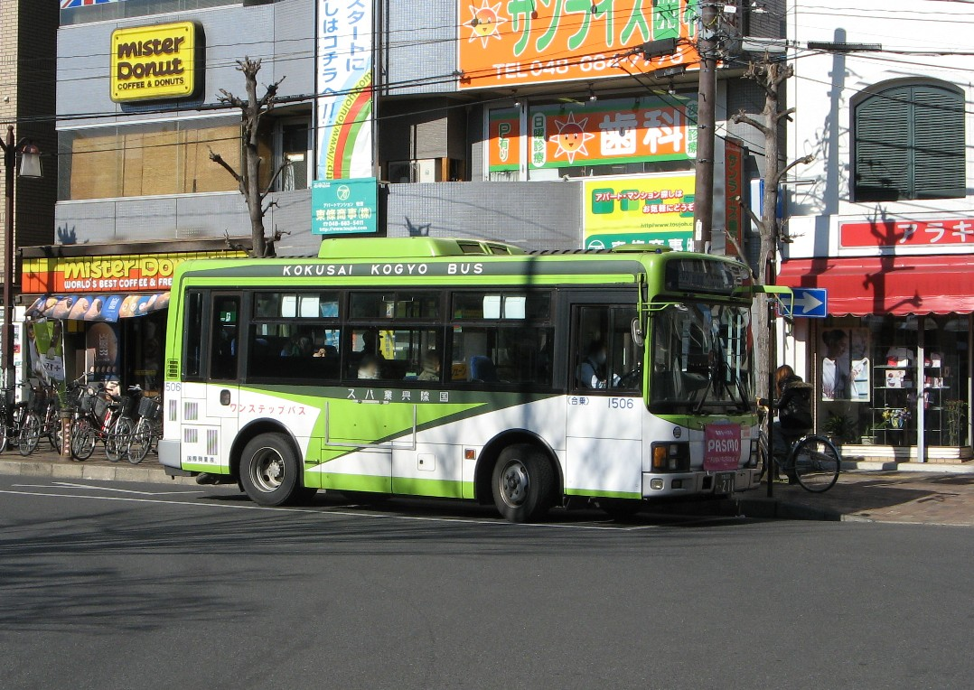 国際興業バス1506号車。さいたま東営業所の所属で、この日は東大宮駅-大和田駅線に投入される。東大宮駅-大和田駅線は小型車や中型幅7ｍ車により運行される。東大宮駅駅前（歩道上）より撮影